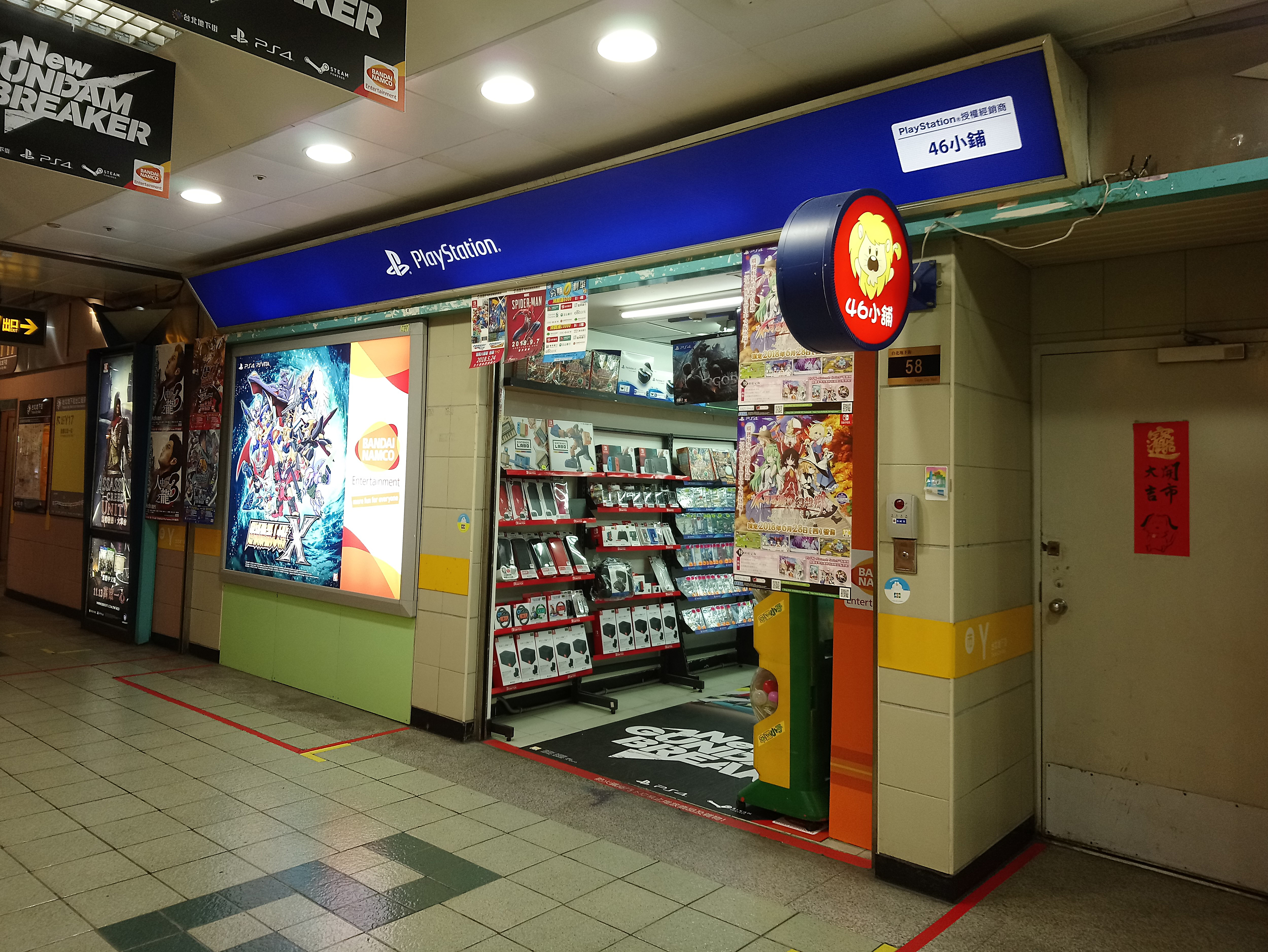 PlayStation授權經銷商46小舖，位於台北地下街58號店。